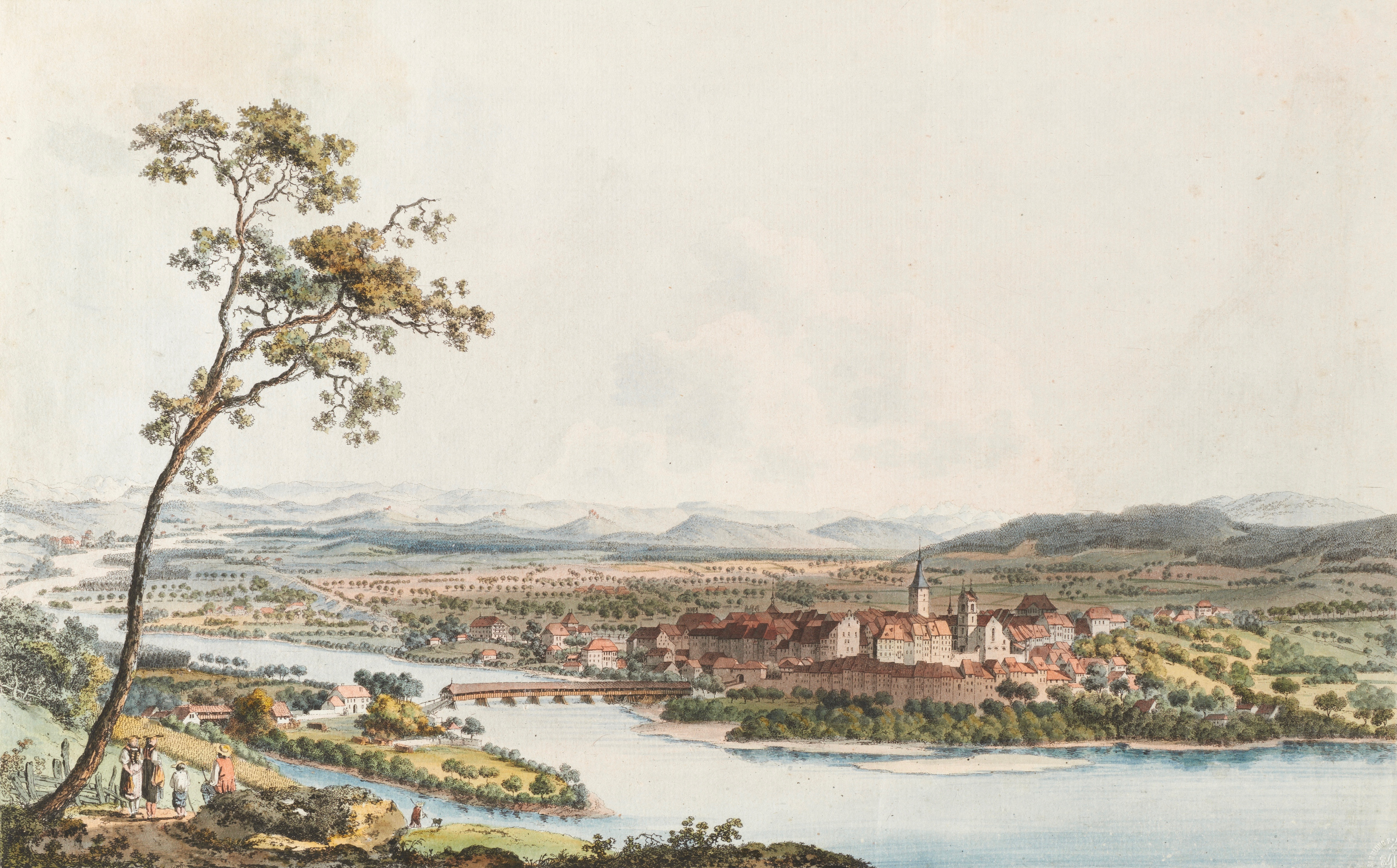 Aarau, Gesamtansicht von Westen. Gezeichnet von Gabriel Lory (genannt Lory père), gestochen von Marquard Wocher. Mit Widmung an Johann Heinrich Rothpletz. 1786. (Schweizerische Nationalbibliothek, Sammlung R. + A. Gugelmann.)